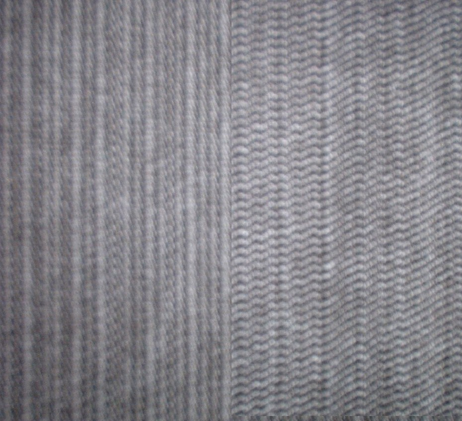 Baumwollgewebe in Struckbindung (links: Oberseite, rechts: linke Seite)